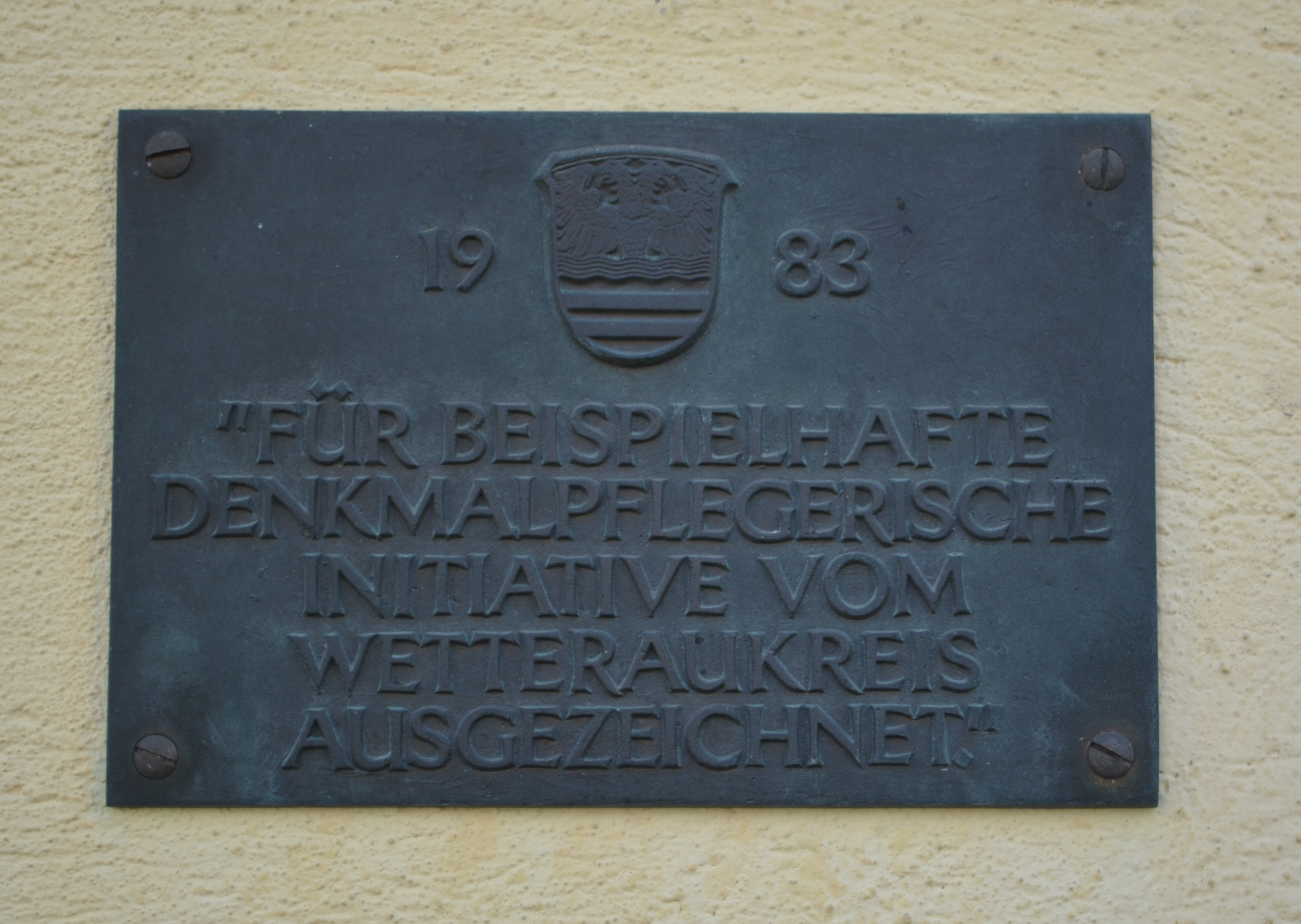 Ober-Rosbach, Baidergasse 4, Schild